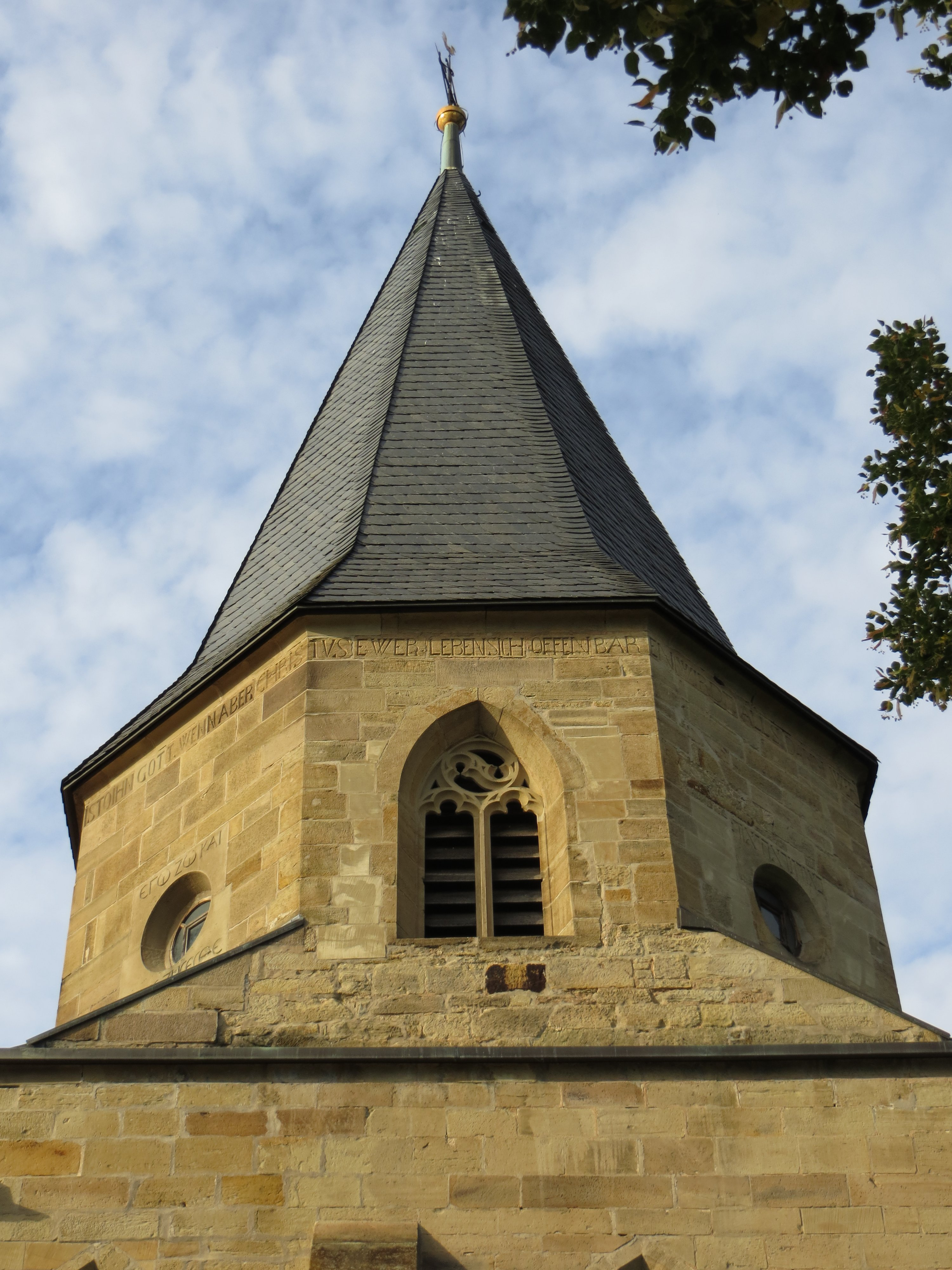 Der Turm der Johanniskirche auf dem Brackenheimer Friedhof von Süden